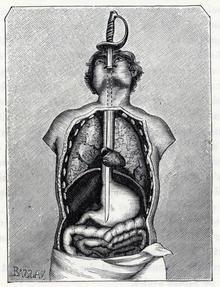 Illustration de Les hommes-phénomènes